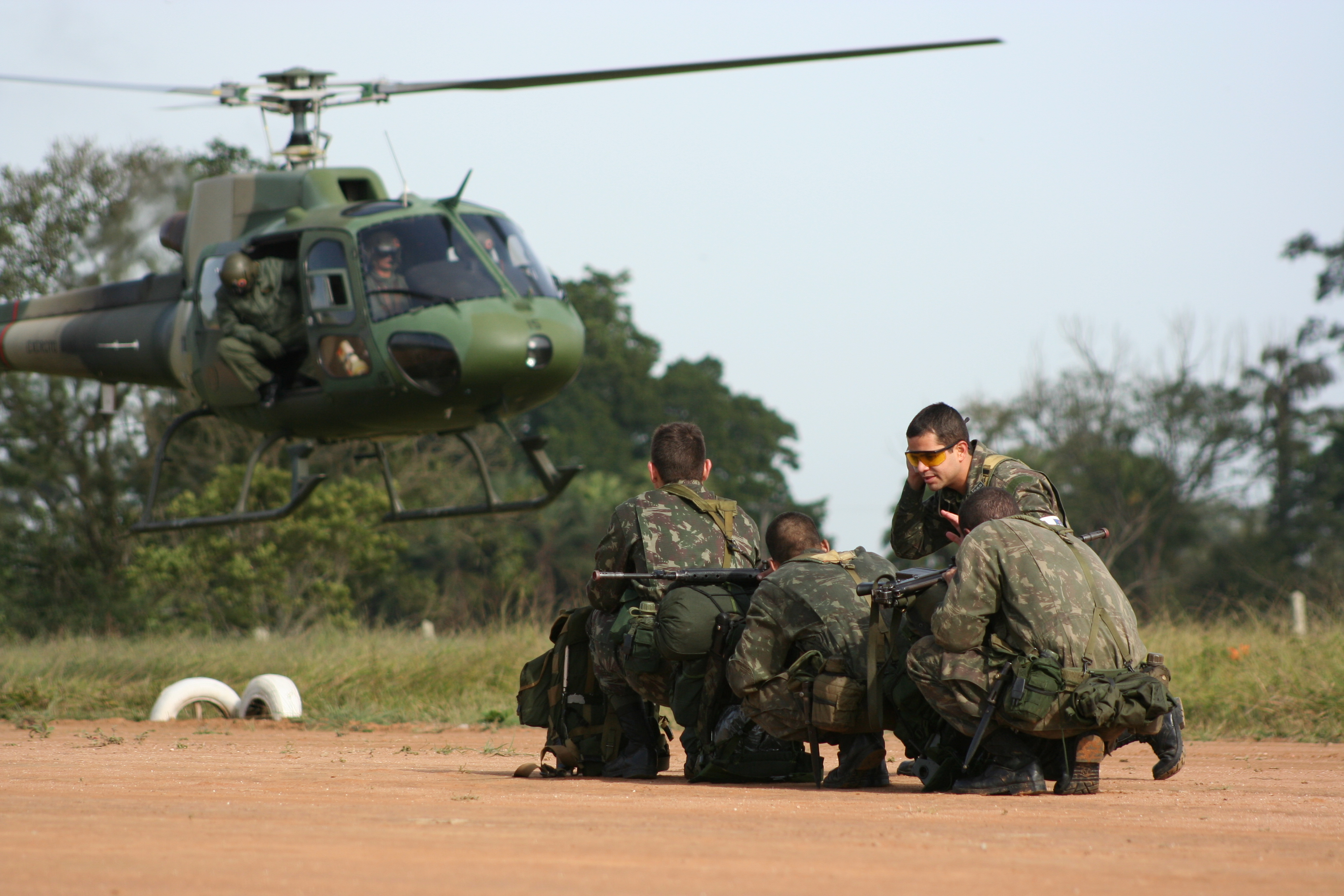 Exfiltração aeromóvel